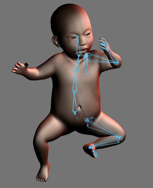 การใช้กระดูกควบคุมรูปร่างของ mesh ในซอฟต์แว์ Blender